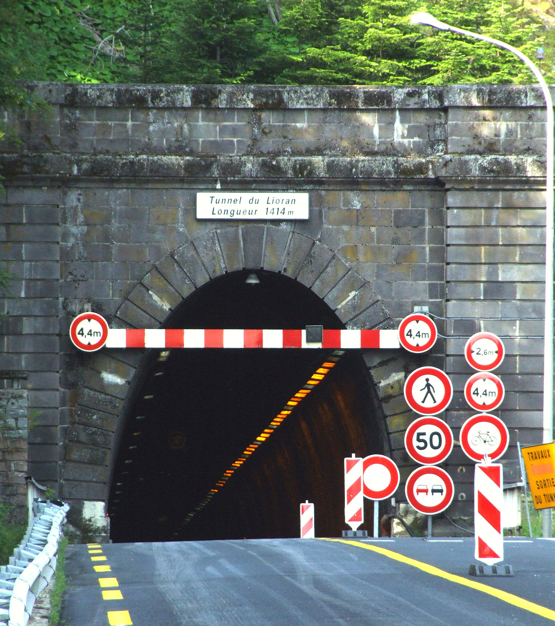 Premier tunnel routier du Lioran